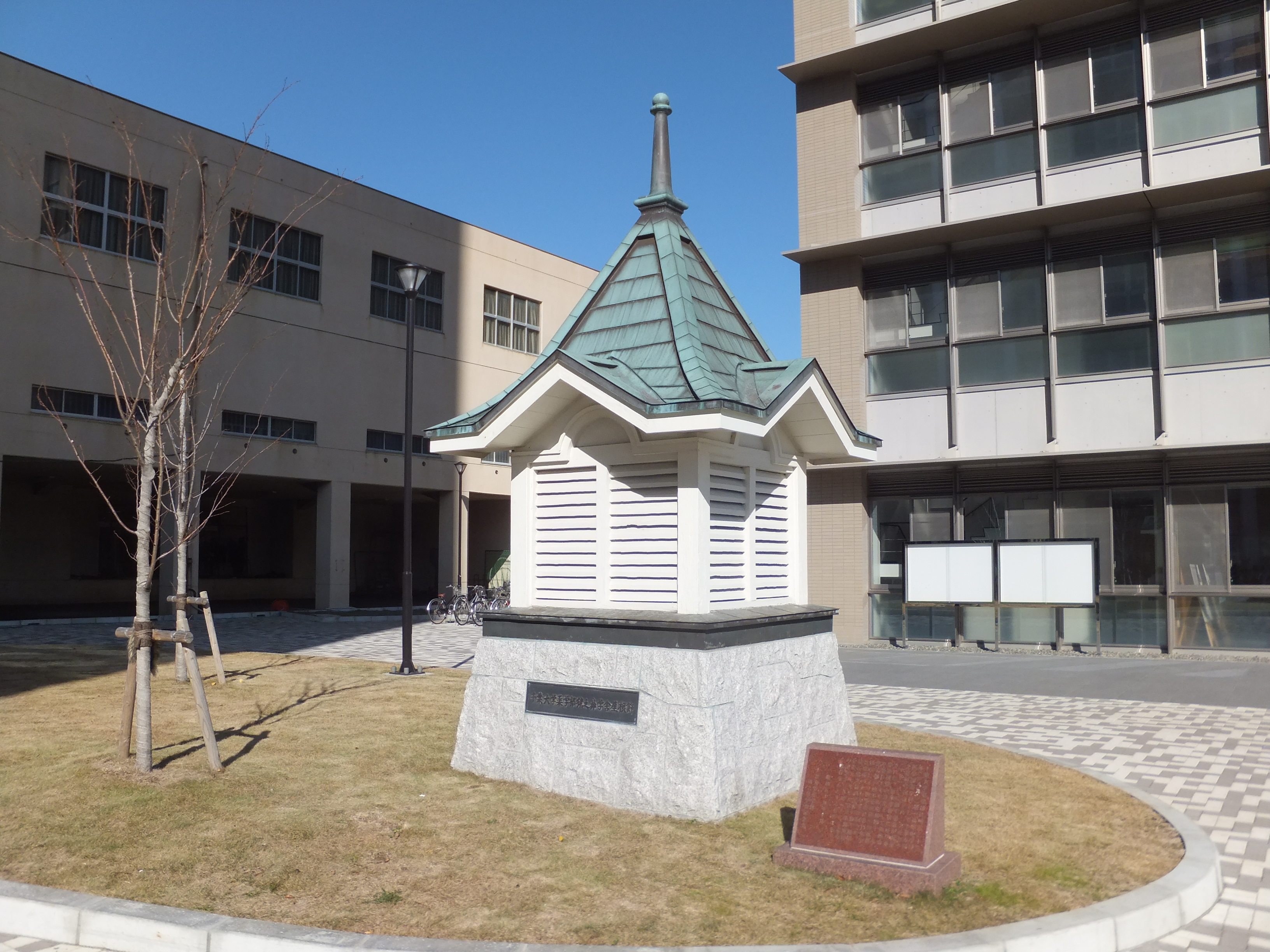 千葉大学亥鼻キャンパスにある旧薬学部猪之鼻学舎屋根飾。1966年(昭和41年)薬学部の西千葉キャンパスへと移転の後、1984年(昭和59年)旧学舎の飾り屋根を復元してモニュメントとしたものである。今日、西千葉キャンパスの設備老朽化に伴い、薬学部の主要研究施設は再び亥鼻キャンパスへと移転している。 以下、説明書き全文(原文ママ) 『千葉大学薬学部は明治二十三年(一八九〇)第一高等中学校医学部薬学科として千葉市猪之鼻町に創設され、大正七年(一九一八)に漸く学舎が新設された。爾来半世紀に亘り薬学徒研鑽の殿堂としての使命を果して来たが昭和四十一年薬学部の西千葉地区への新築移転により旧学舎は老朽化の為解体の止むなきに到った。玆に猪之鼻旧学舎の飾り屋根を復元し千葉大学薬学部発展の記念すべき礎石として末永く保存せんとするものである。 昭和五十九年十月 千葉大学薬学部猪之鼻学舎記念会』